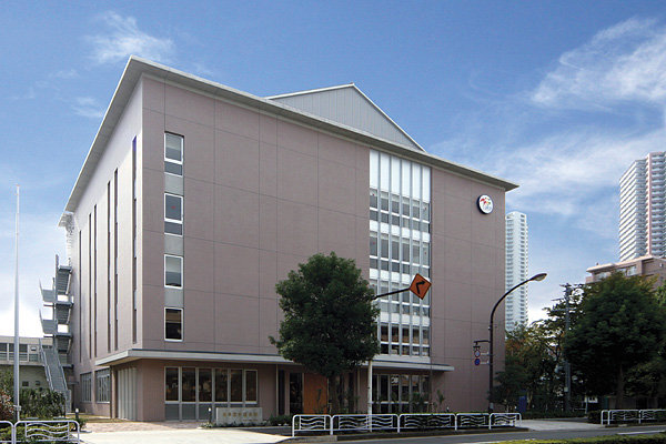 全日本空手道連盟（日本空手道会館） JKF Building